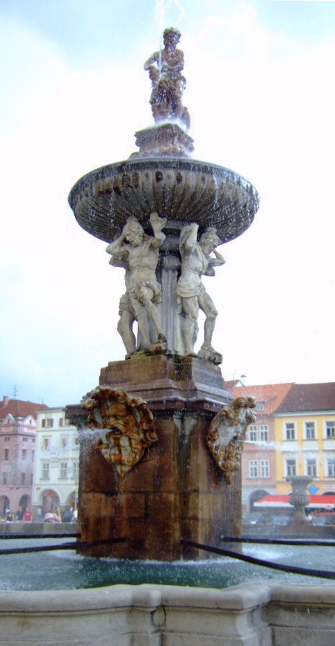 České Budějovice Aufnahme: 12. Juli 2006 Url